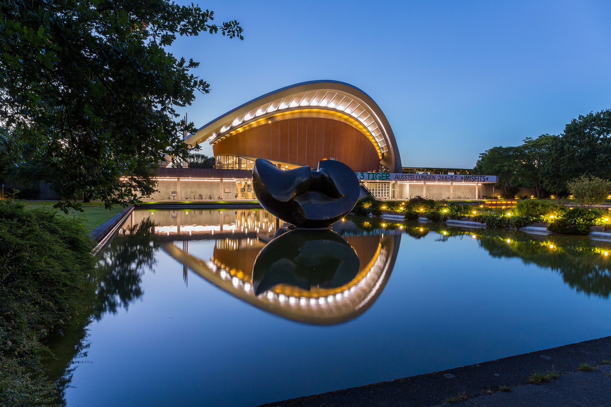 500px provided description: Das Haus der Kulturen der Welt an der John-Foster-Dulles-Allee im Gro?en Tiergarten in Berlin. Das Geb?ude wurde nach Pl?nen des amerikanischen Architekten Hugh Stubbins als Kongresshalle errichtet. Das Geb?ude spiegelt sich im davor befindlichen Spiegelbecken. [#pond ,#mirroring ,#Berlin ,#Kongresshalle ,#Reflection ,#Mirror ,#Mitte ,#Berlin-Mitte ,#Blue hour ,#Spiegelung ,#Reflektion ,#Blaue Stunde ,#Reflexion ,#Reflexionen ,#Haus der Kulturen der Welt ,#Reflektionen ,#HKW ,#Schwangere Auster ,#Mitte (district of Berlin)]